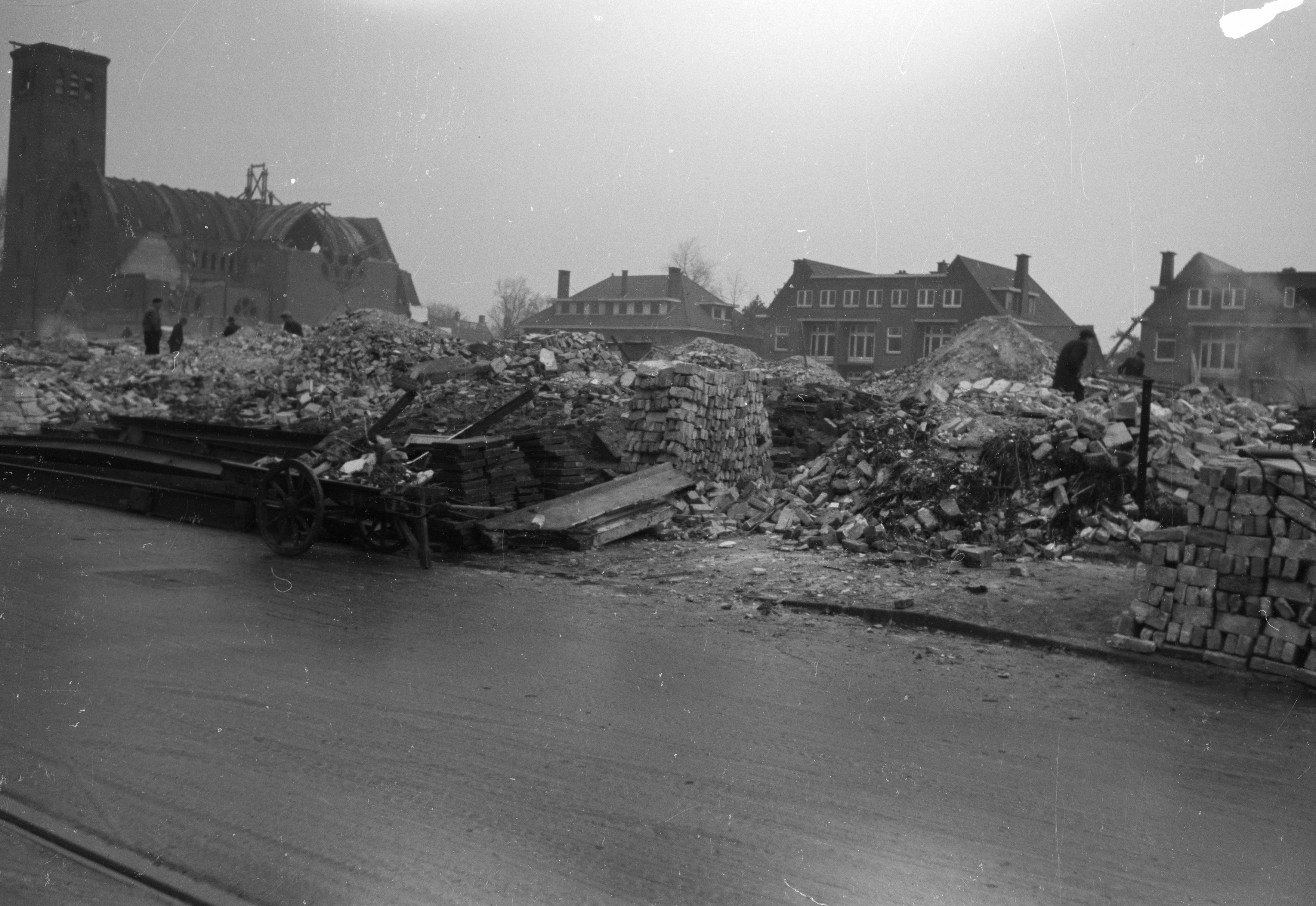 Foto uit de collectie Huizinga van het NIOD. De vrijwel gesloopte R.K. kerk aan de Cornelis de Wittlaan wegens aanleg van de 'Atlantikwall'. Menno Huizinga was onderdeel van de Ondergedoken Camera en maakte illegaal foto’s tijdens de bezetting. Dit deed hij hoofdzakelijk in zijn woonplaats Den Haag.